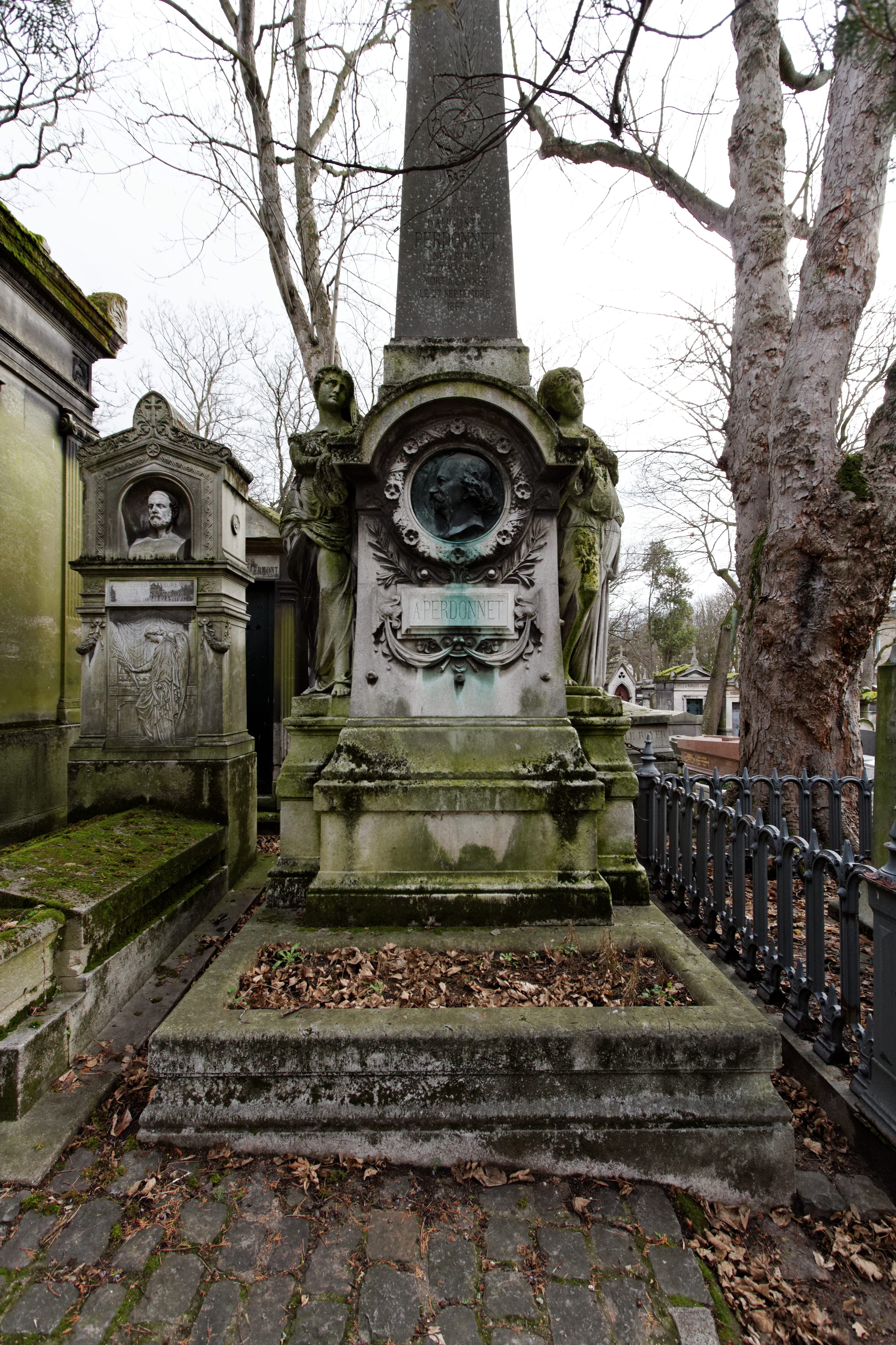 Sépulture d'Auguste Perdonnet (1801-1867), directeur de l'école Centrale Paris. Obélisque orné d'un médaillon et de deux statues.